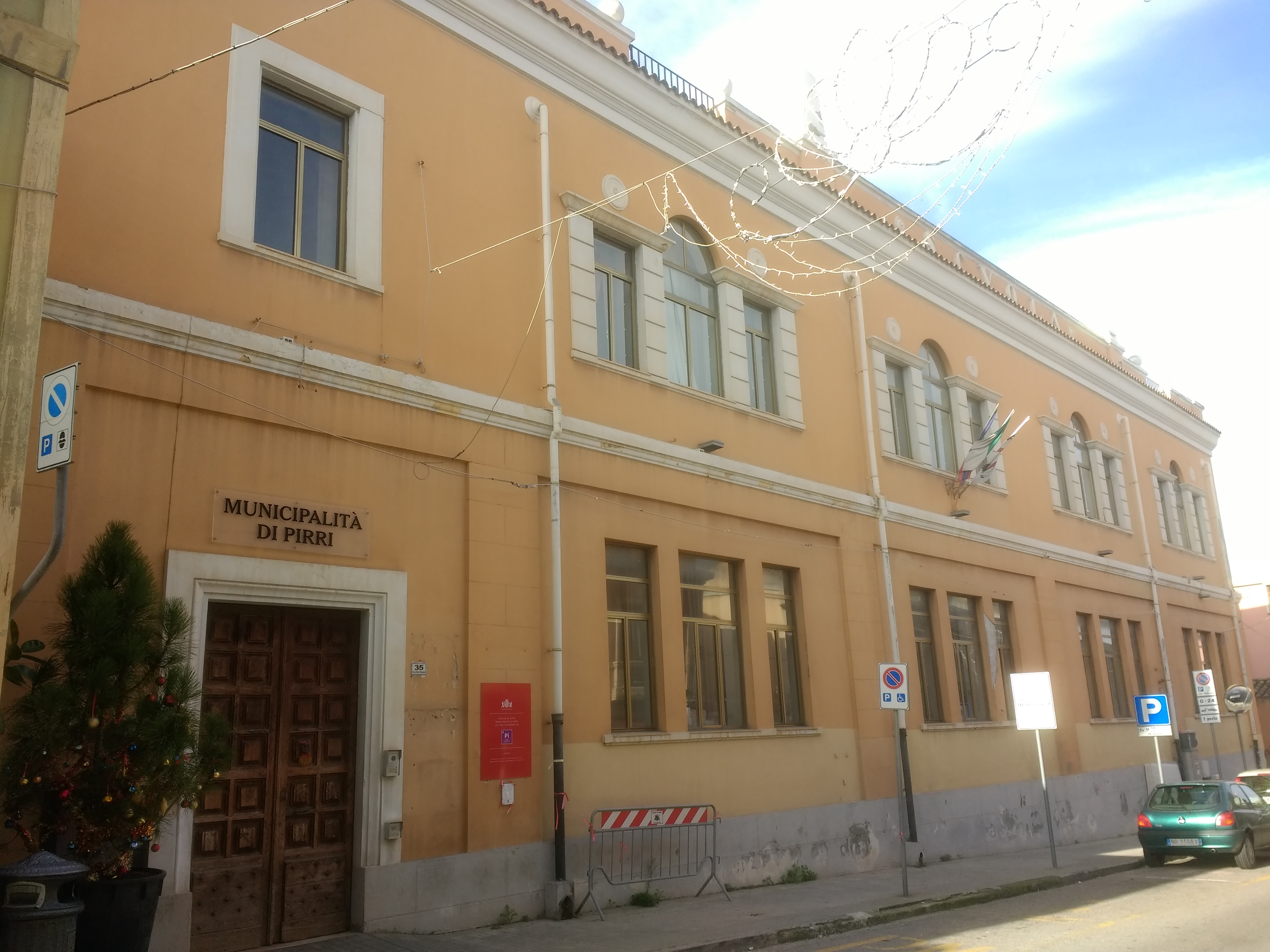 Foto scattata a Pirri nel dicembre 2019